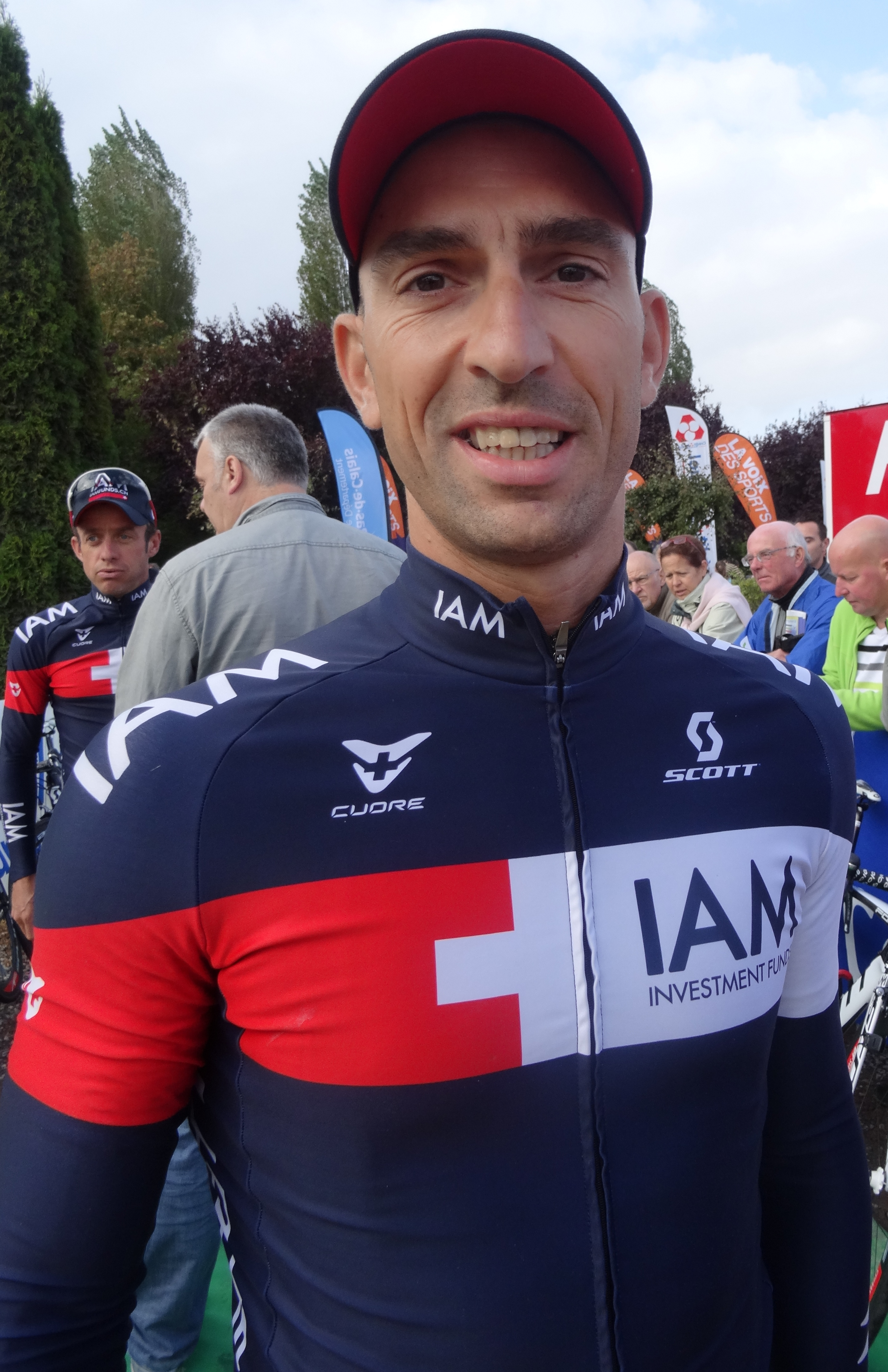 Reportage réalisé le dimanche 21 septembre à l'occasion du départ et de l'arrivée du Grand Prix d'Isbergues 2014 à Isbergues, Nord-Pas-de-Calais, France.